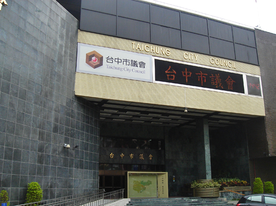 1972-2010年間的臺中市議會大樓